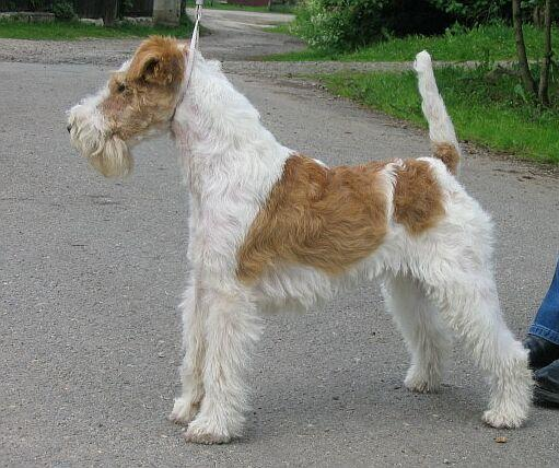 Elias ´t Beuke Jagerken